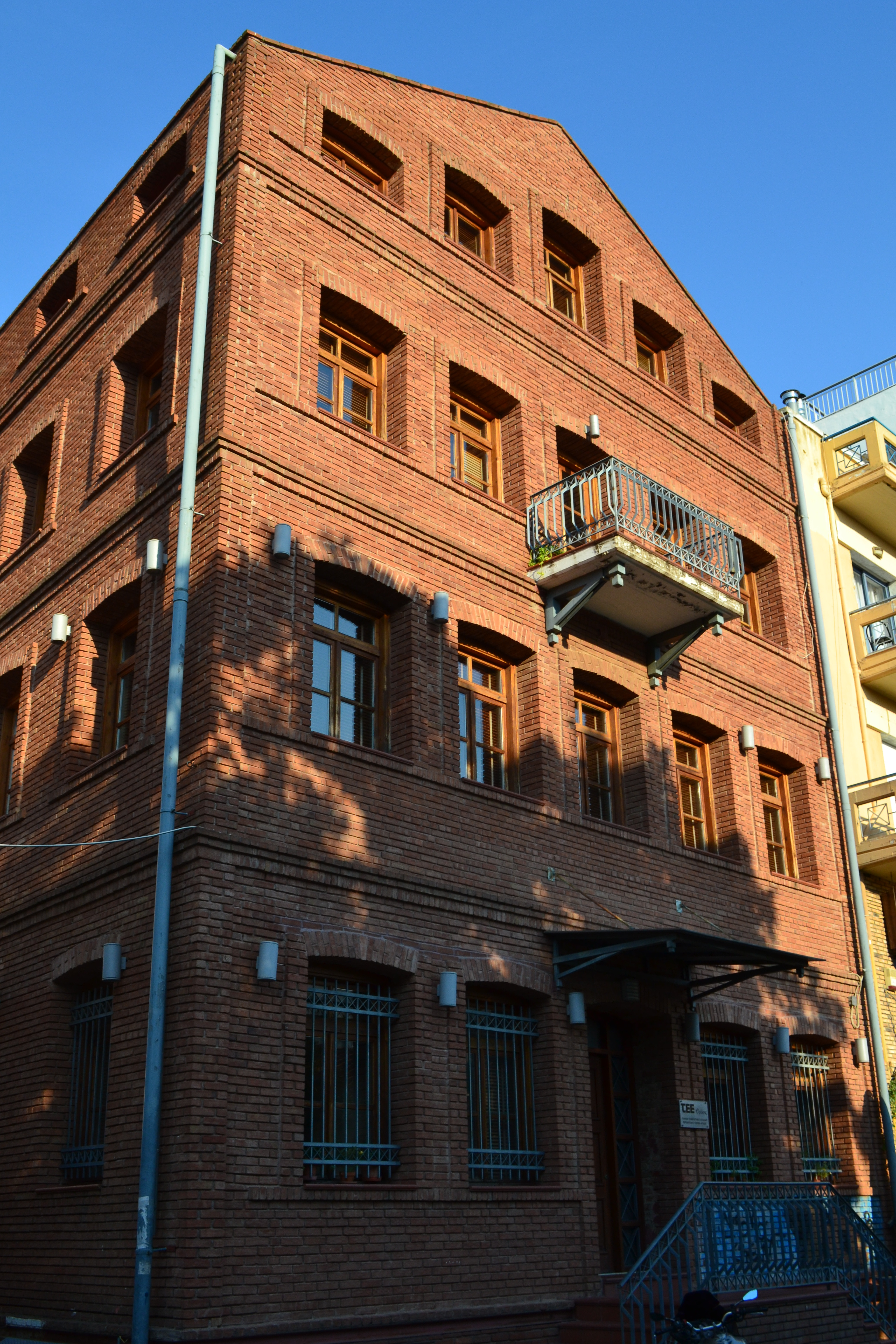 Καπναποθήκη οδού Παρνασσού 8, Κομοτηνή«Καπναποθήκη οδού Παρνασσού 8»